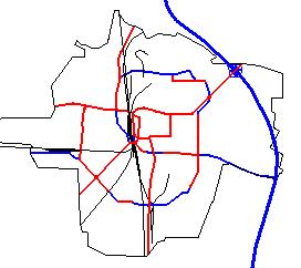 Schemat dróg w Ostrowie Wielkopolskim. Drogi czerwone - istniejące, drogi niebieskie - planowane/w budowie.